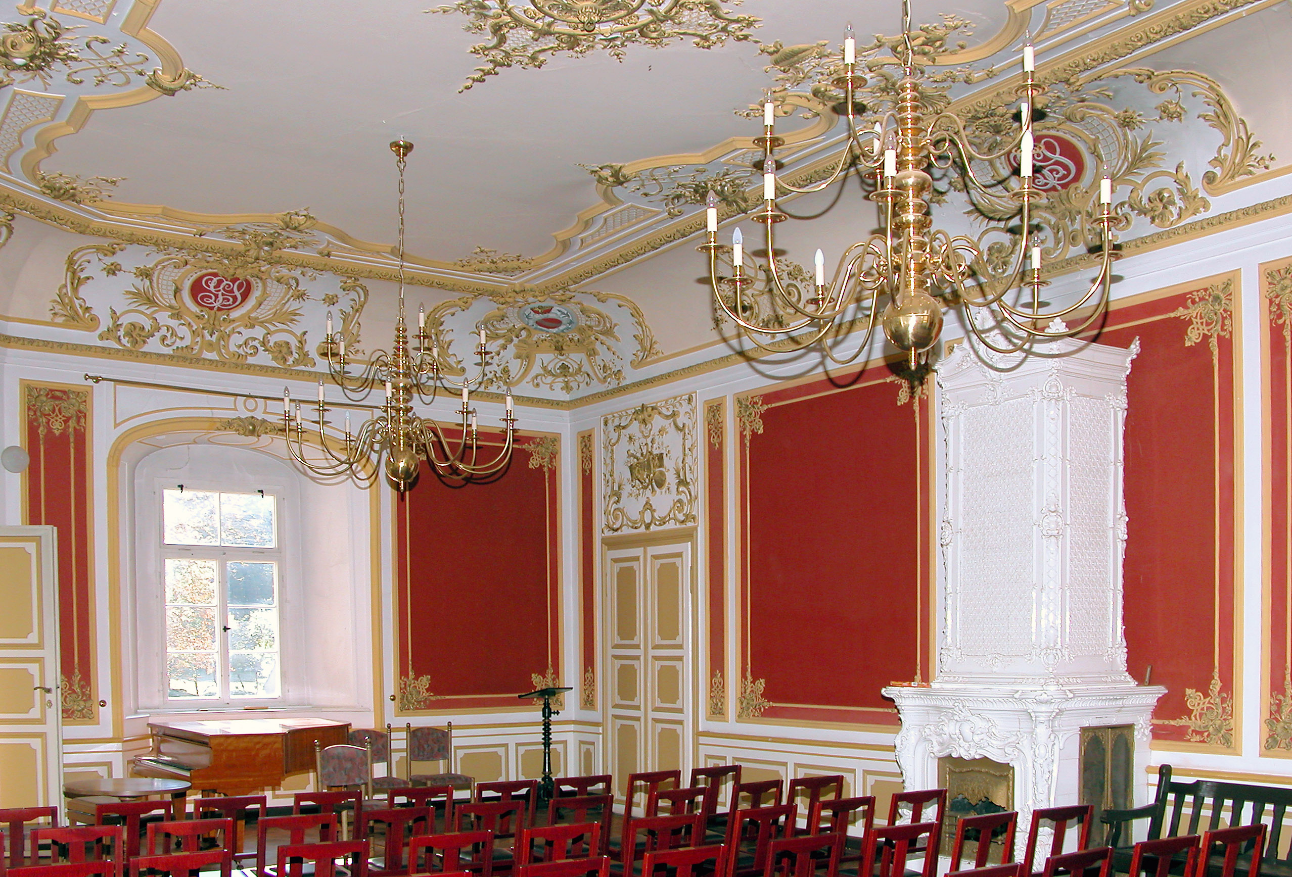 12.10.2004 01458 Hermsdorf (Ottendorf-Okrilla), Schloßstraße: Wasserschloß Hermsdorf (GMP: 51.164413,13.819631). Ursprünglich 16. Jahrhundert. Nach Brand von 1729 Wiederaufbau durch George Bähr bis 1732. Barocksaal im 1. OG. Decke aber erst Ende 19. Jahrhundert. Monogramm des Prinzen Georg von Schönburg-Waldenburg. [DSCN5629.TIF]20041012390DR.JPG(c)Blobelt